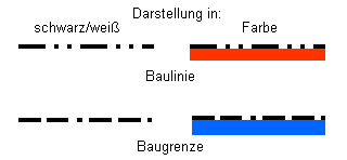 Baulinie